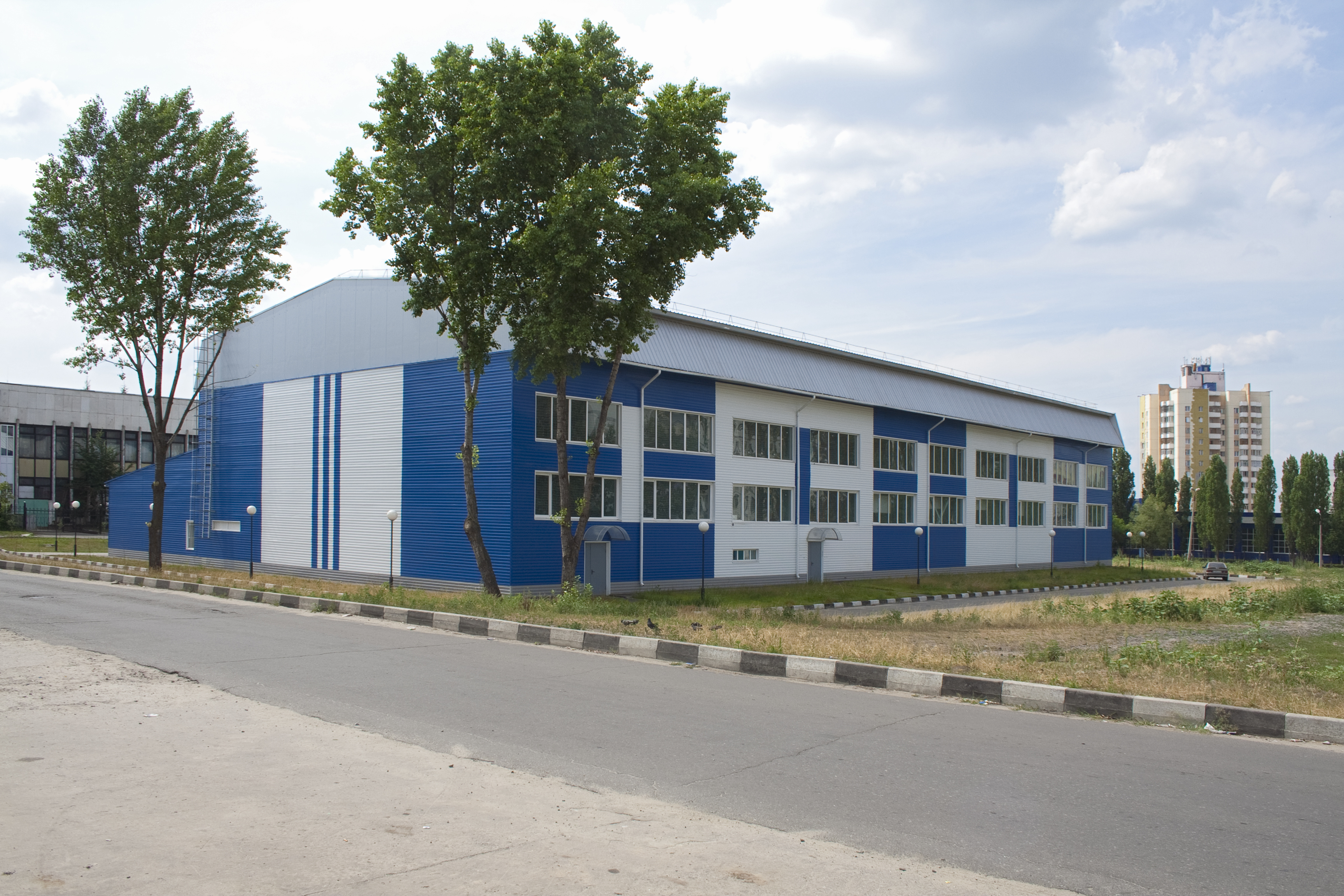 ФОК «Студенческий». Физкультурно-оздоровительный комплекс. Город Старый Оскол.